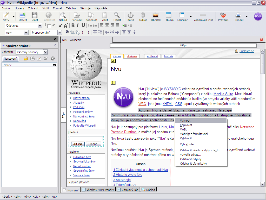 Ukázka Nvu 1.0 v české verzi pro operační systémy Microsoft Windows při manipulaci s jednou ze stránek Wikipedie